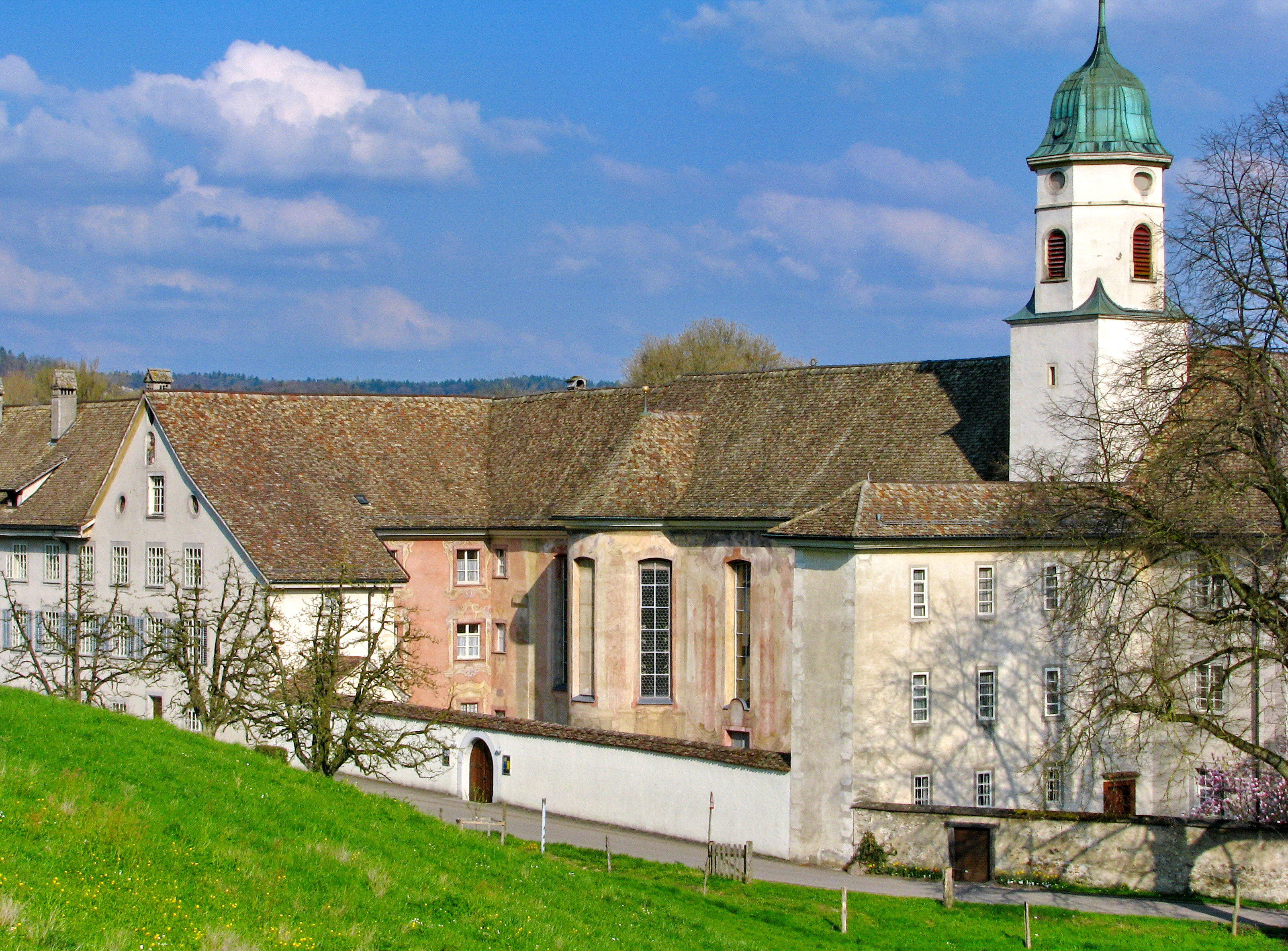 Kloster Fahr in Würenlos, Unterengstringen to the left, Limmattal in the background.